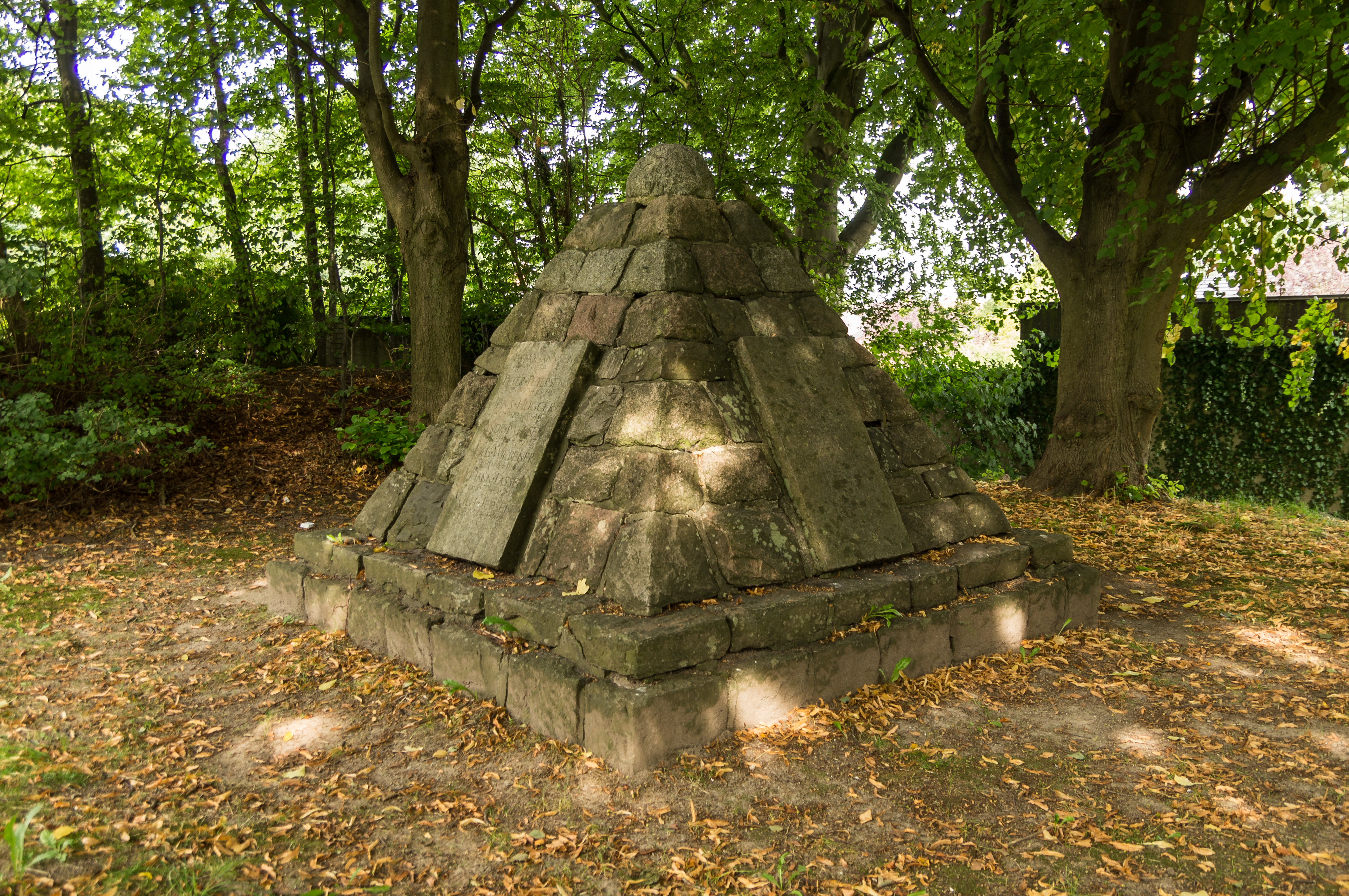 Flensburg-Mürwik, Twedter Holz, Gedenkstein für die Gefallenen der Gemeinde Twedter Holz im 1. Weltkrieg